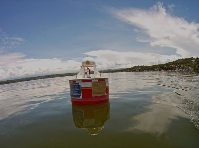 Boya que indica la iglesia hundida de San Juan Bautista Tequesquitengo